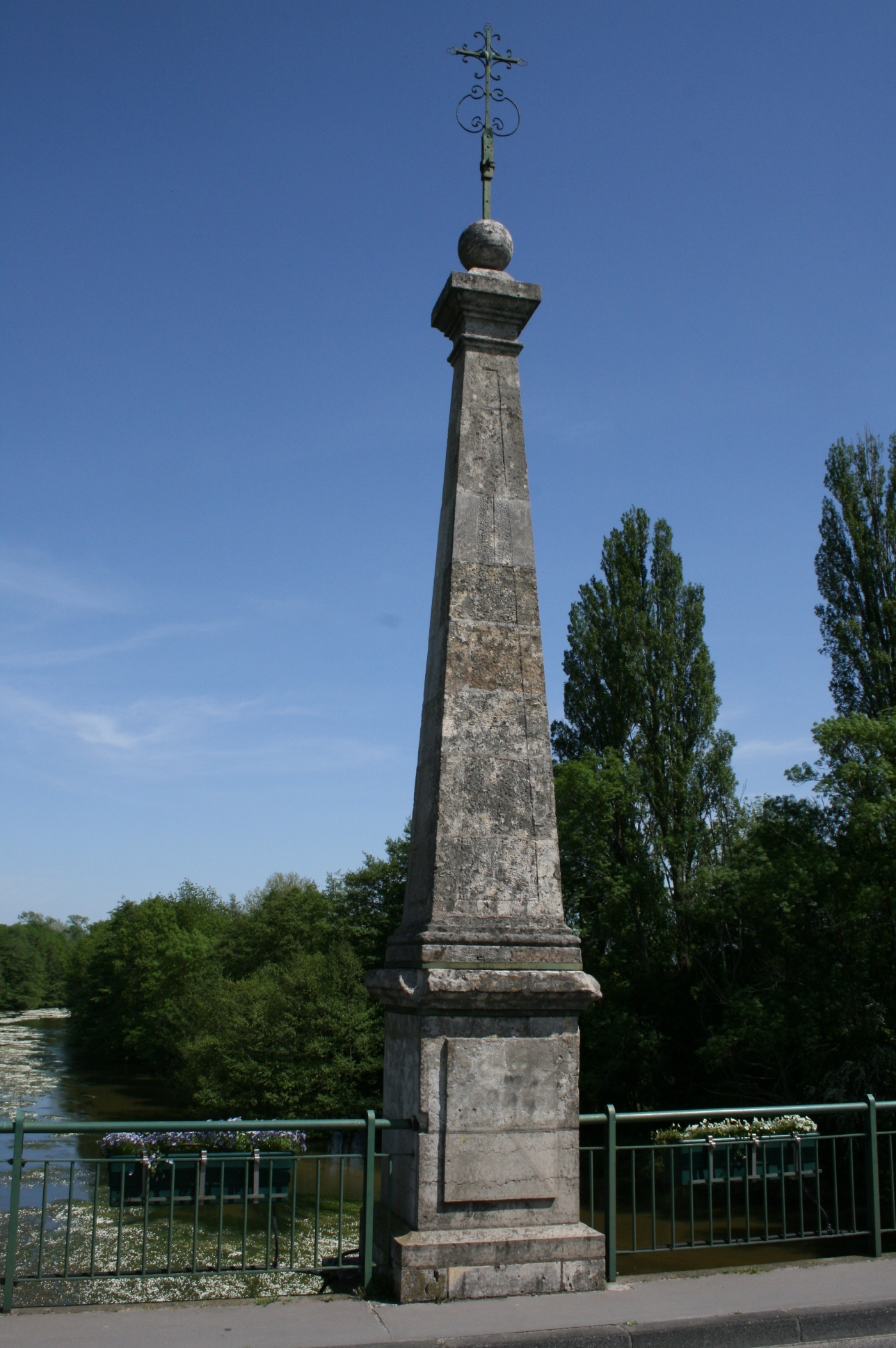 Pont Saint-Nicolas sur le Loiret – Communes de Saint-Pryvé-Saint-Mesmin et Saint-Hilaire-Saint-Mesmin – Département du Loiret – France – Pont en maçonnerie - Vue rapprochée de l'obélisque